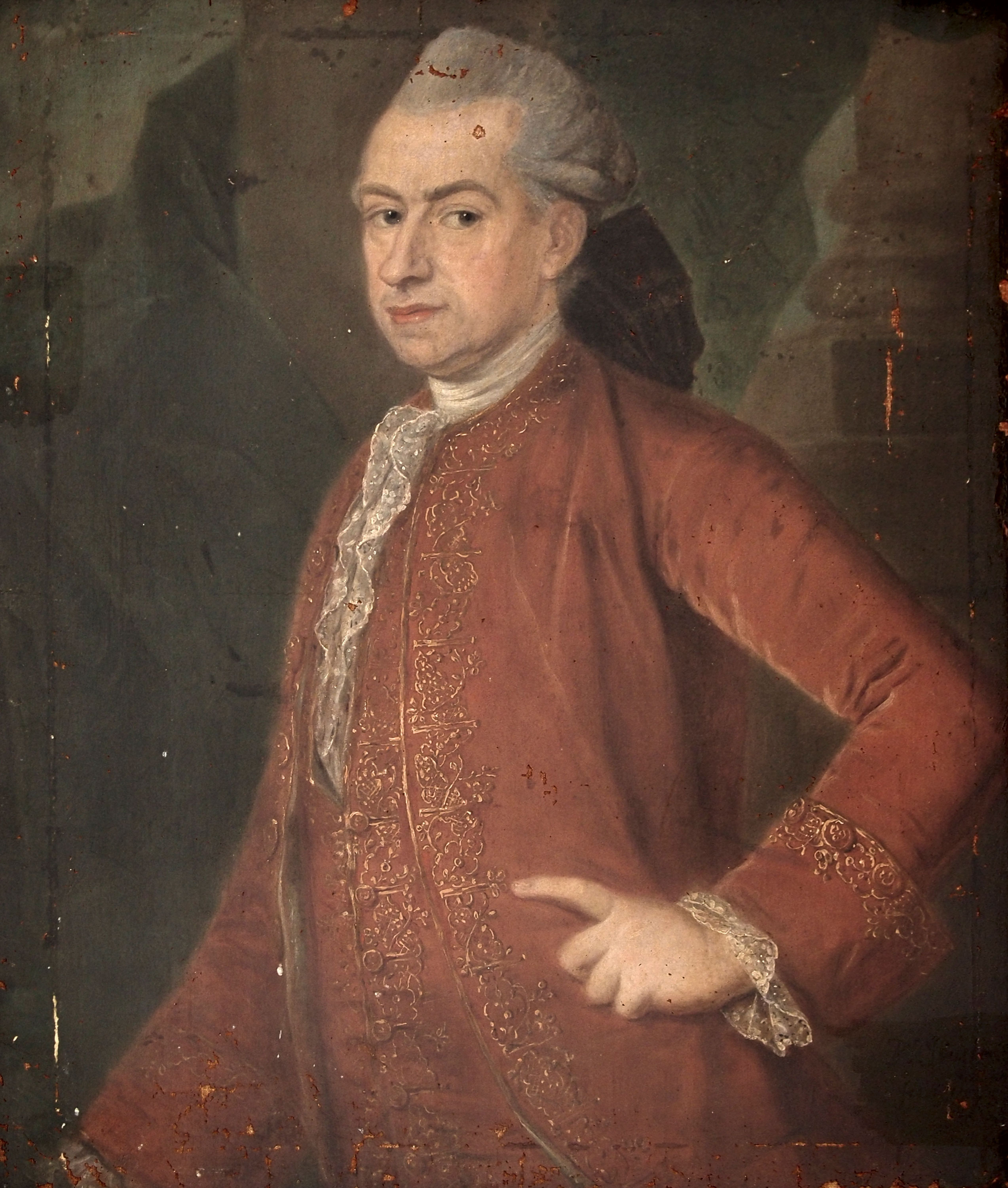 Retrato del estadista y politico ilustrado español Zenón de Somodevilla (1702-1781), que fue marqués de la Ensenada y llegó a ocupar los cargos de secretario de Hacienda, Guerra y Marina e Indias. Asimismo fue nombrado sucesivamente superintendente general de Rentas, lugarteniente general del Almirantazgo, secretario de Estado, notario de los reinos de España y caballero de la Orden del Toisón de Oro y de la Orden de Malta, siendo además consejero de Estado durante los reinados de Felipe V, Fernando VI y Carlos III de España.